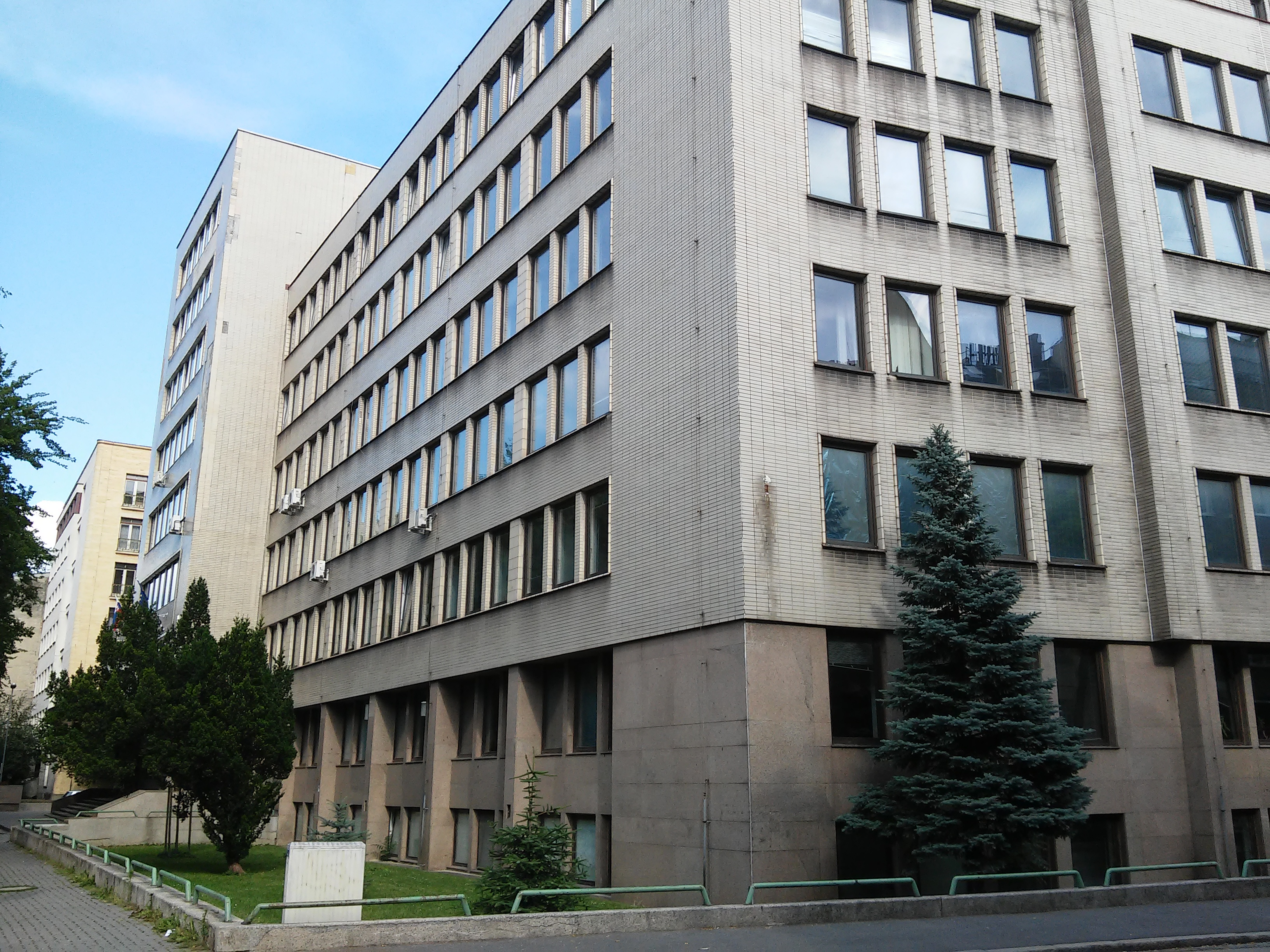 Dobrovičova 12, Staré Mesto, Bratislava